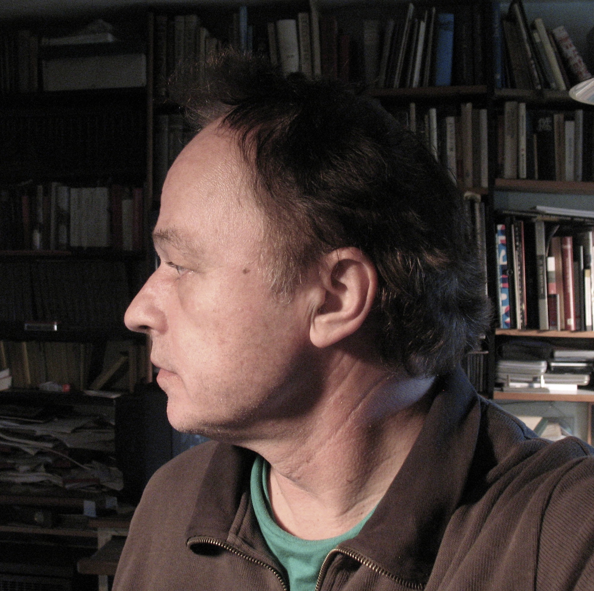 Porträt Harry Walter